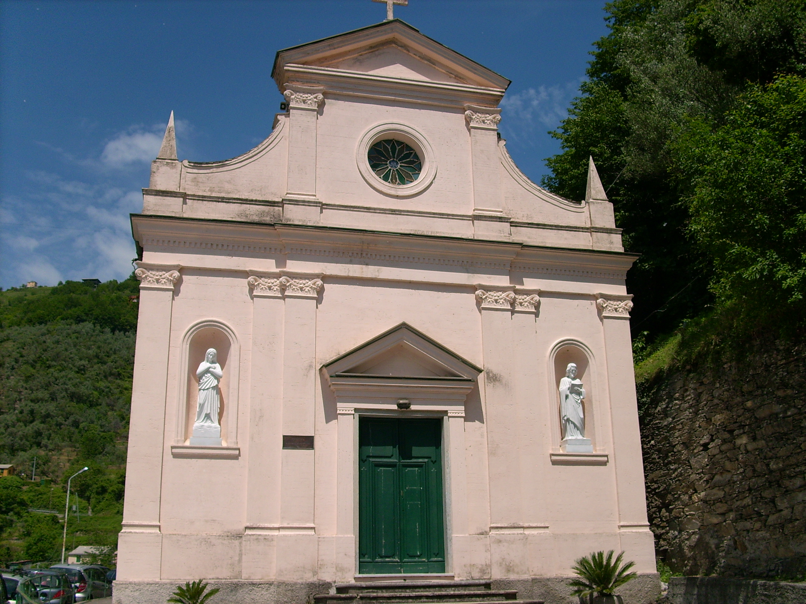 Chiesa di Santa Maria Immacolata di Sussisa (Sori), Liguria, Italia